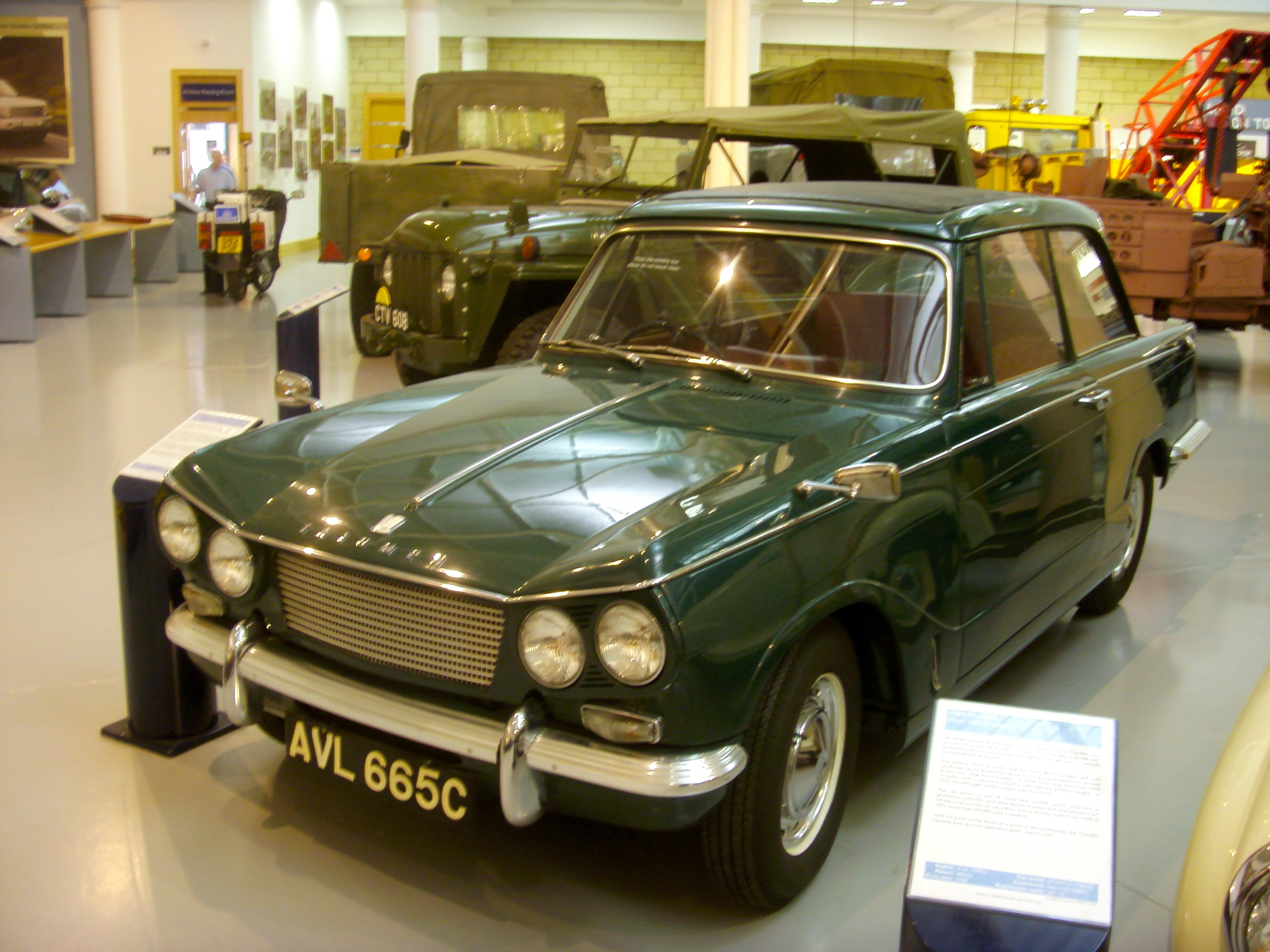 1965 Triumph Vitesse